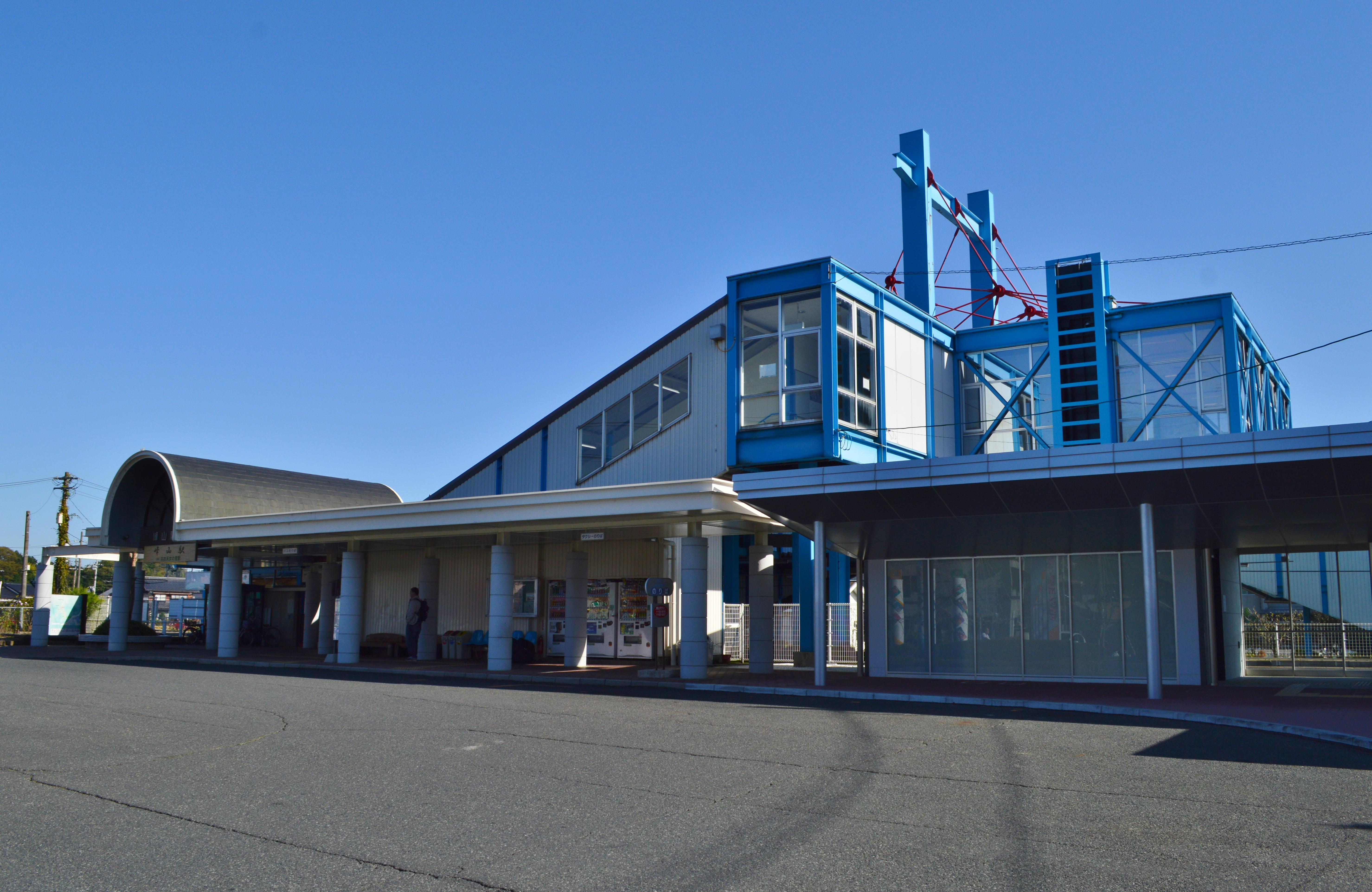 峰山駅 駅舎